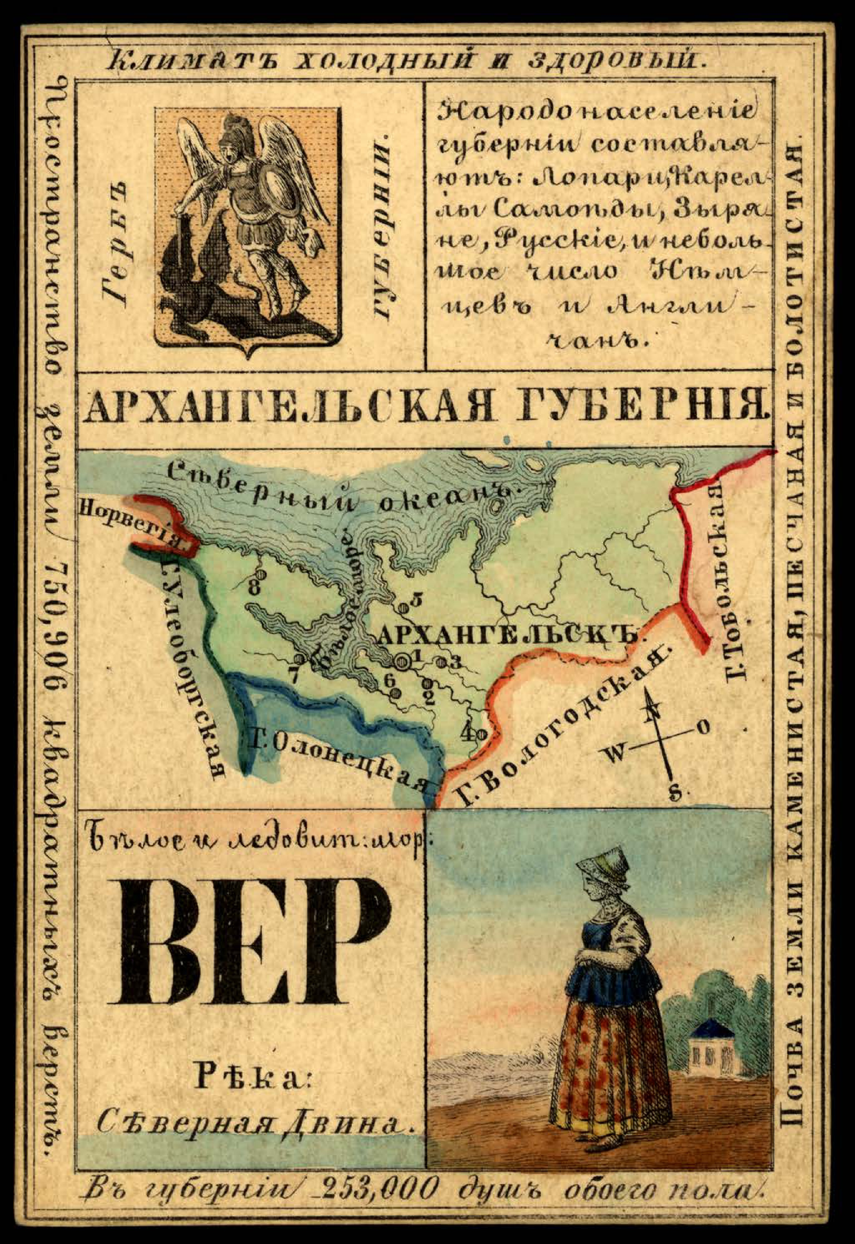 Карточка из набора географических карточек Российской Империи